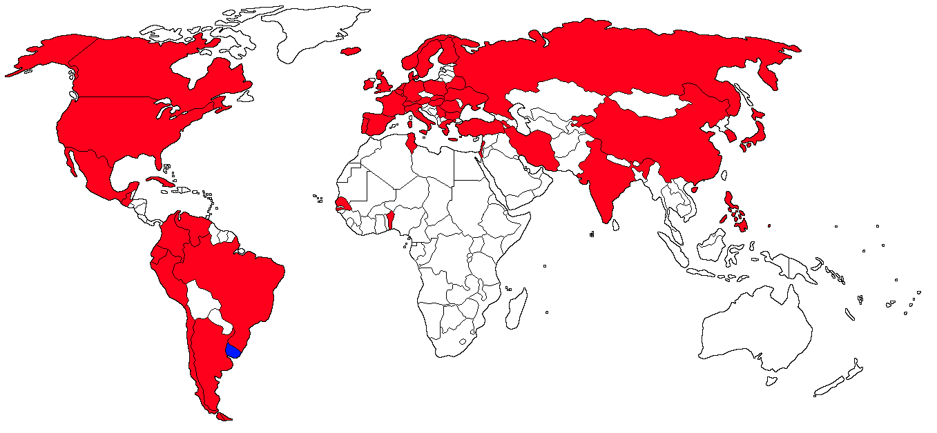 Mapa